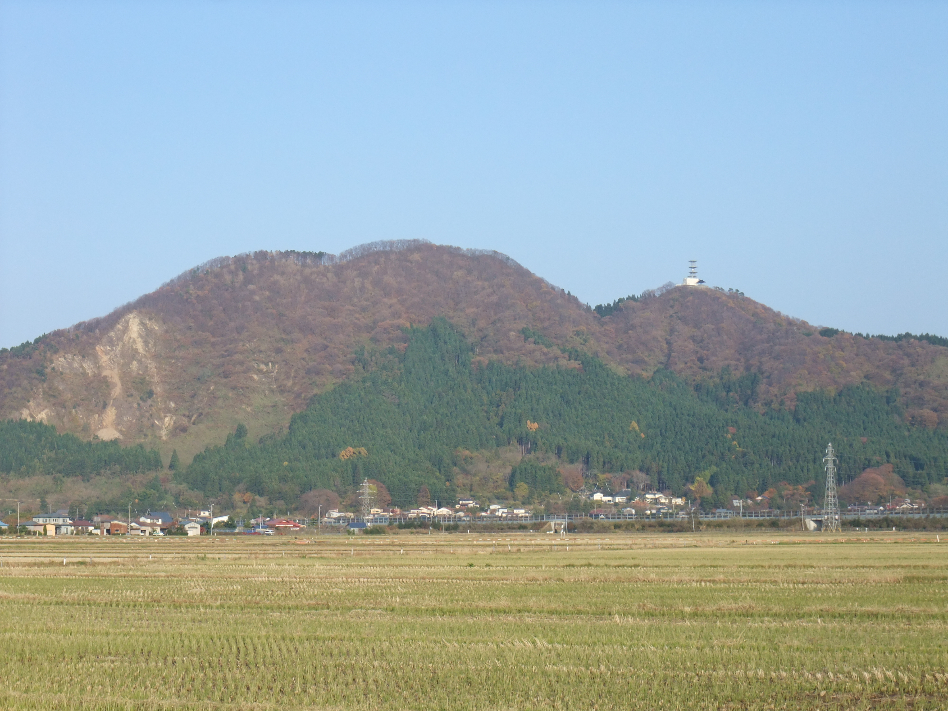 秋田県五城目町のシンボル 森山